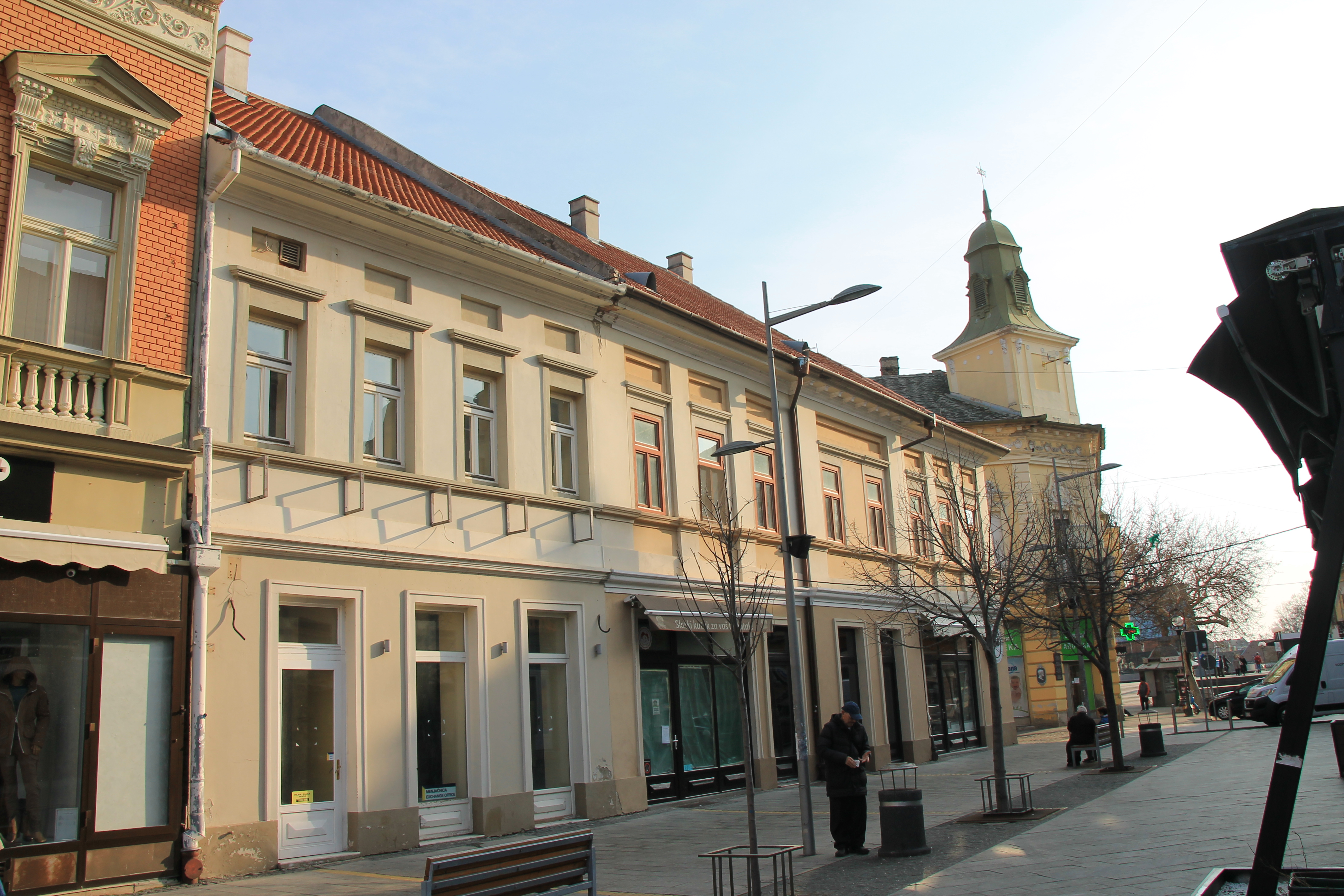 Staro jezgro Zrenjanina